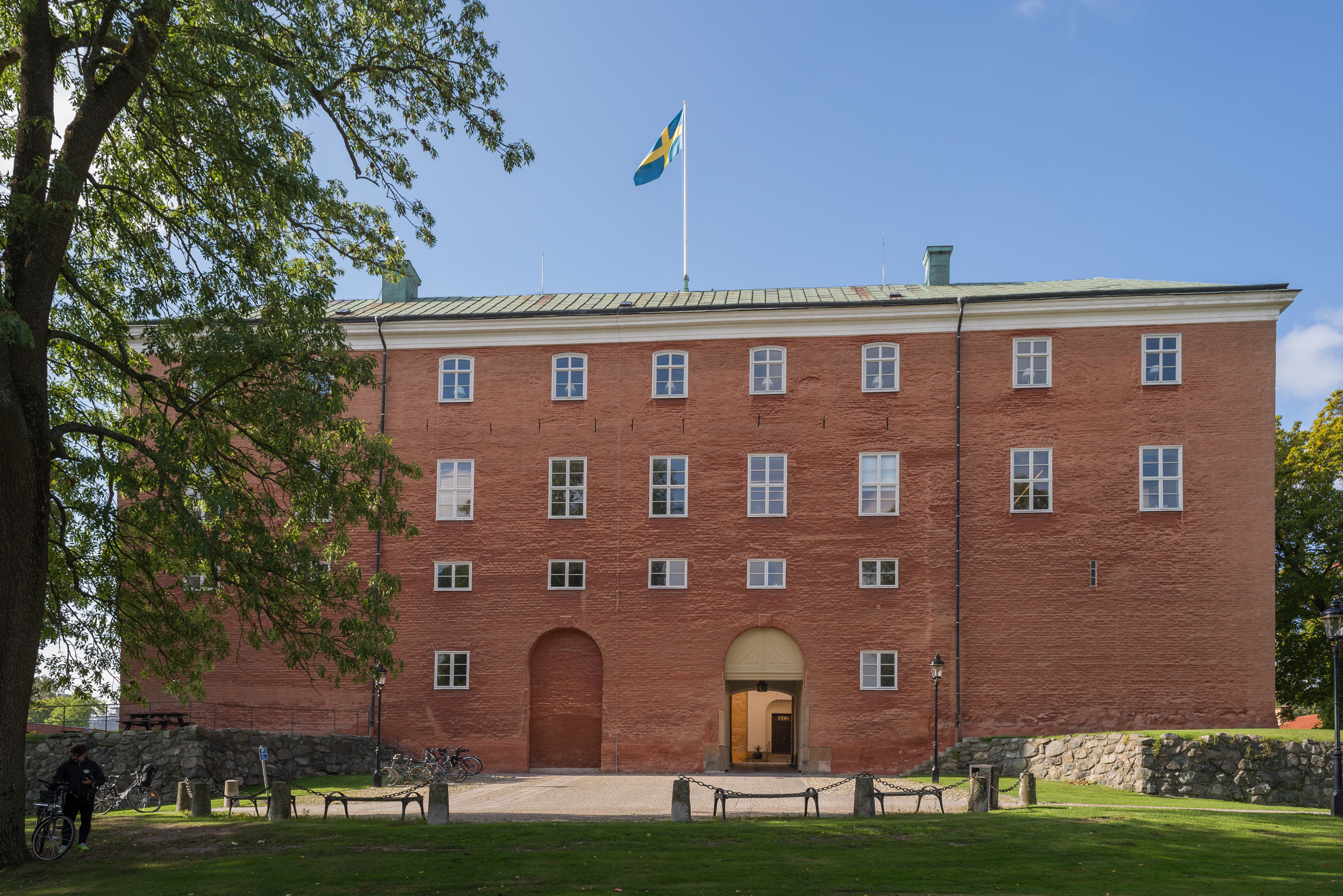 Västerås slott (Olympia 3)